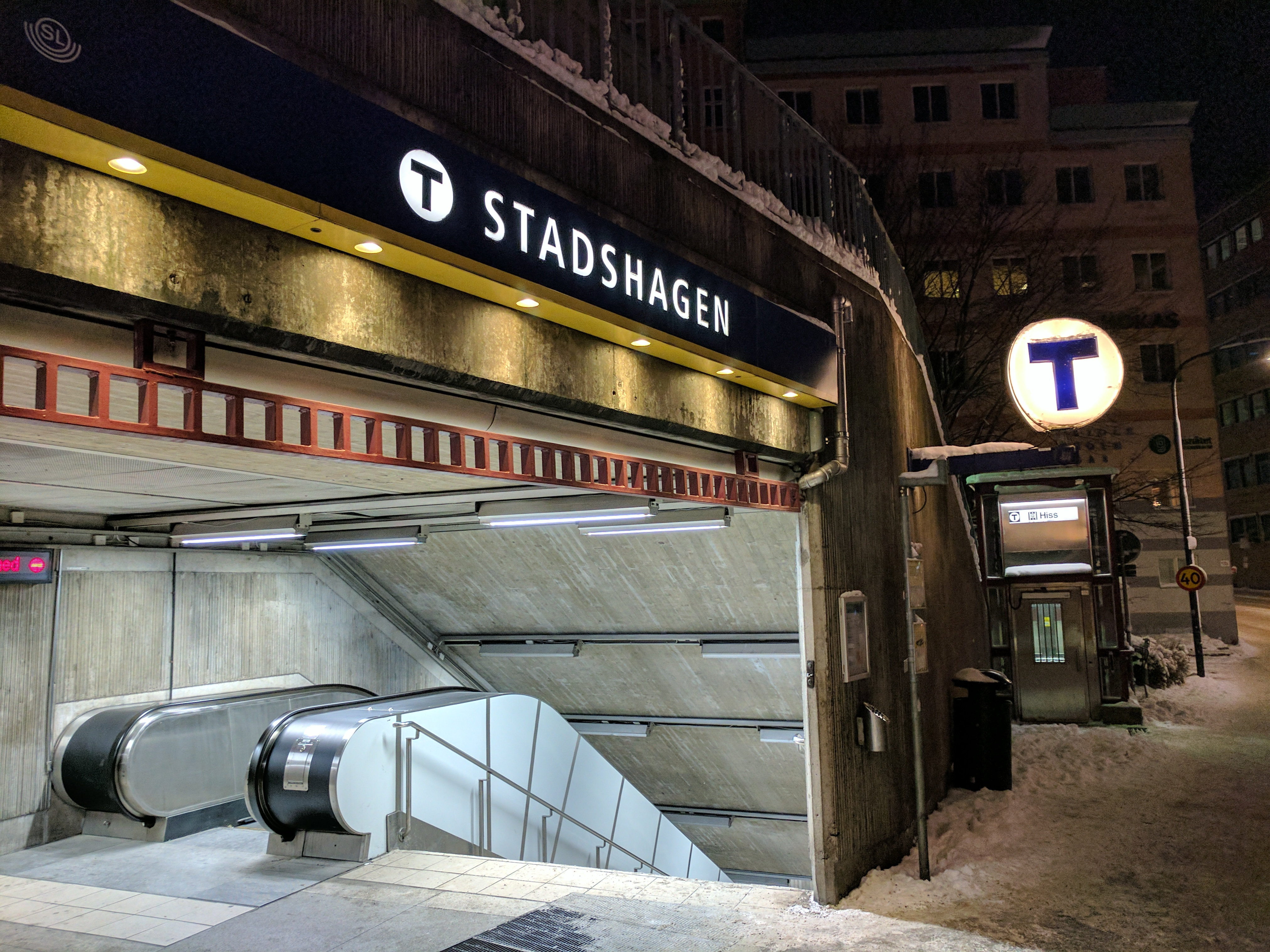 Stadshagen januari 2017 utanför